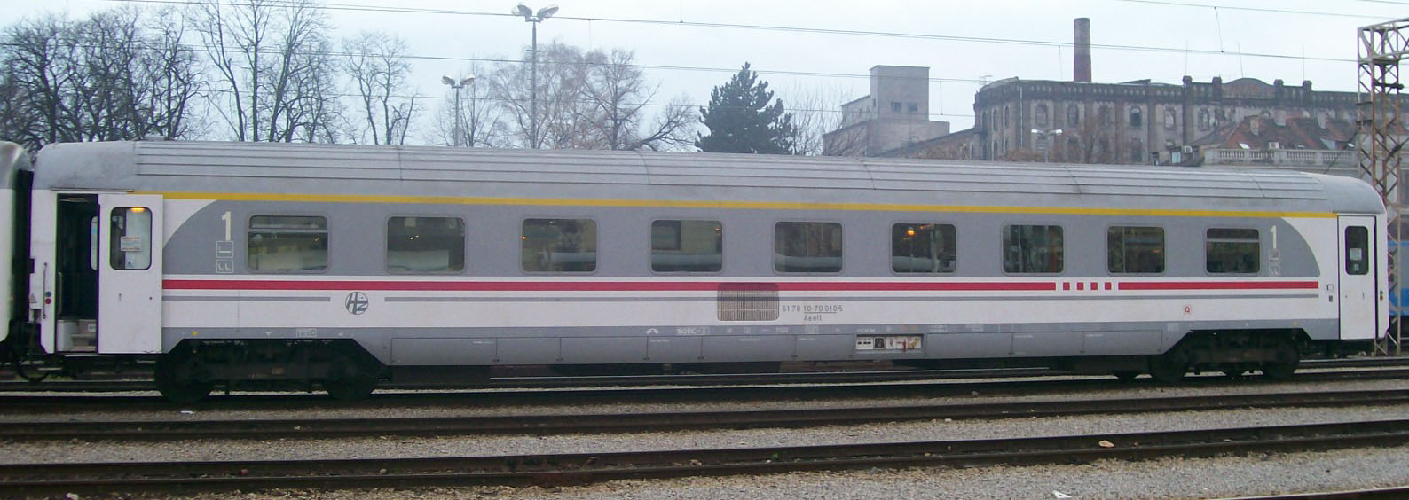 Vagon sa sjedalima 1. razreda - klimatizirani Hrvatskih željeznica (Slovna serija Aeelt)